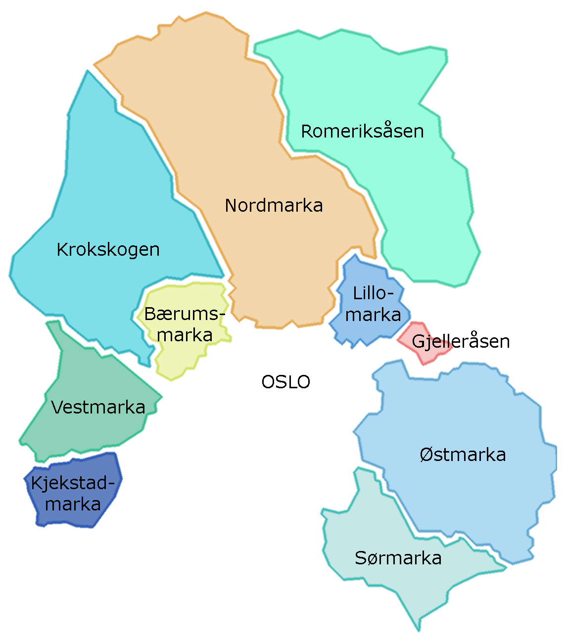 Kart over Oslomarka / Oslomarka map